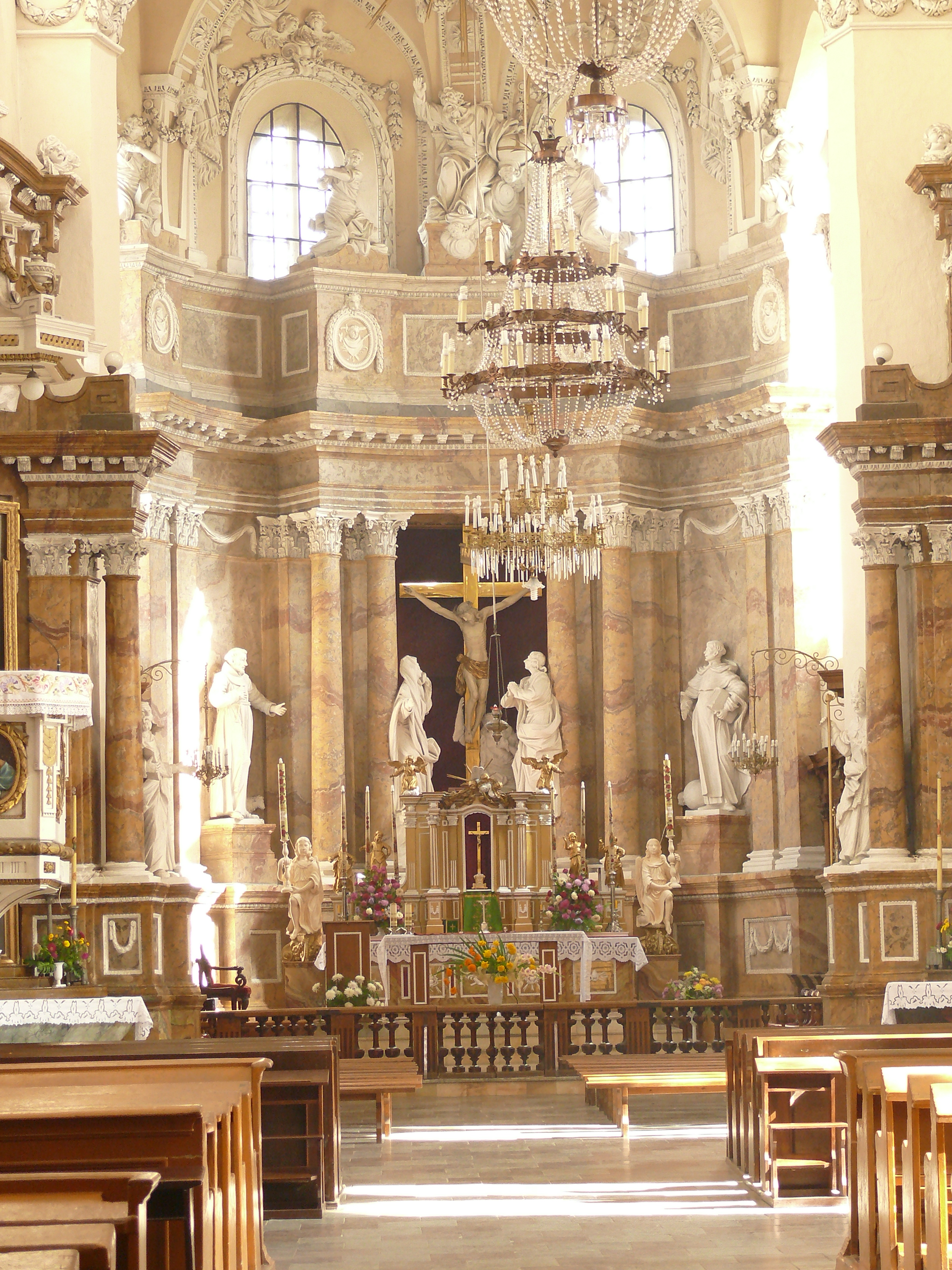 Беларуская (тарашкевіца): Ансамбль былога кляштара бернардзінцаў:касьцёл са званіцайдэкаратыўнае аздабленьне інтэр’ера касьцёла: галоўны алтар, восем алтароў, фрэскавыя кампазіцыі цэнтральнага нэфа, арнамэнтальныя росьпісы ілепка, барэльефныя кампазіцыі,хоры, рашотка і дзьверы бабінца, дэкор Ларэтанскай капэлы, расьпісныя дзьверы ў паўночным нэфежылы корпусагароджа. г. Горадня This is a photo of Belarusian heritage monument. Reference number: 412Г000018 ( WLM)